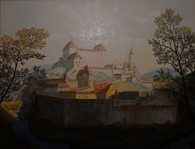 Hrad Dívčí kámen, olej na plátně 110x85 cm